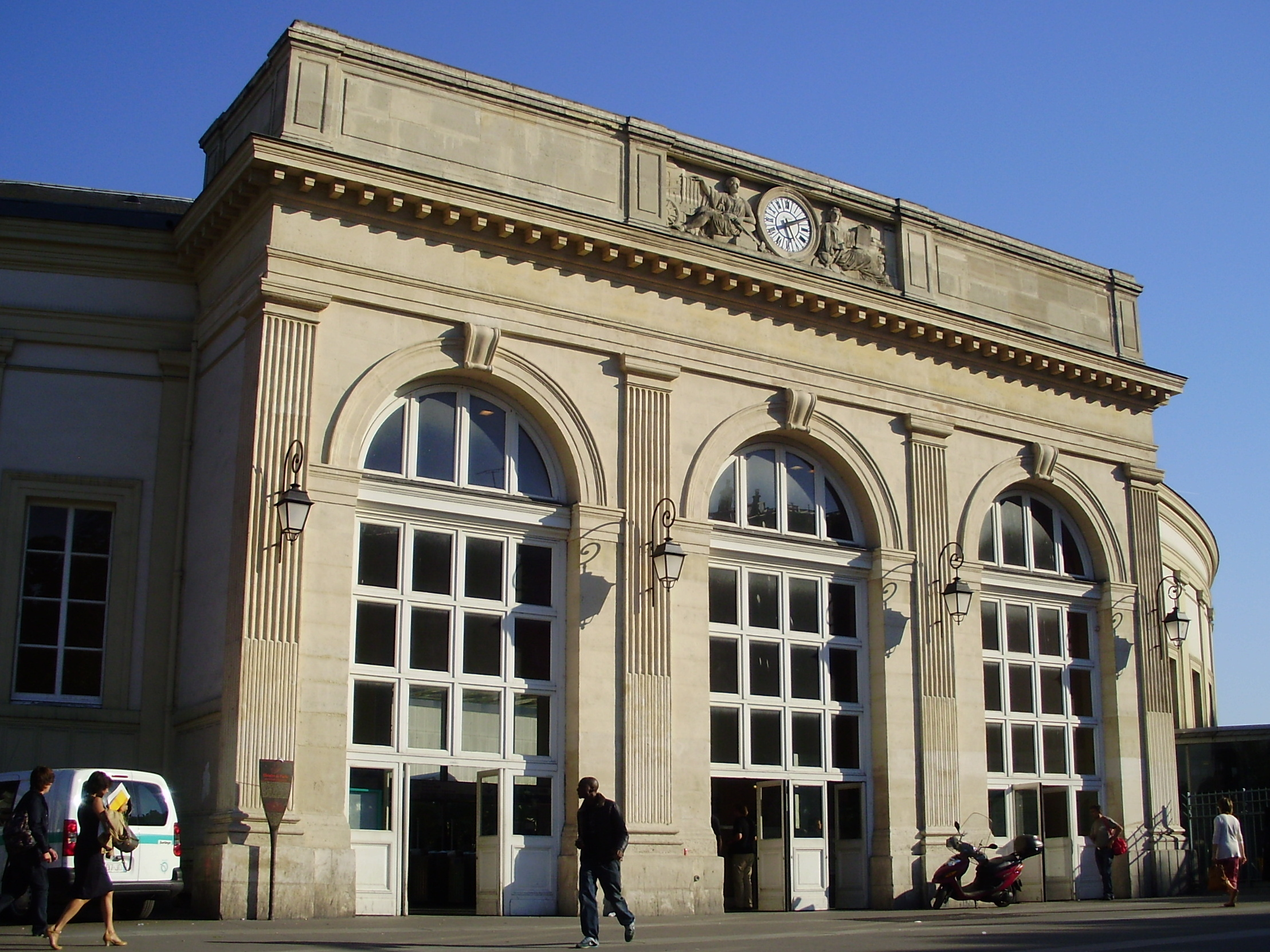 Gare de Denfert-Rochereau, Paris 14e, France (entrée du bâtiment voyageurs)